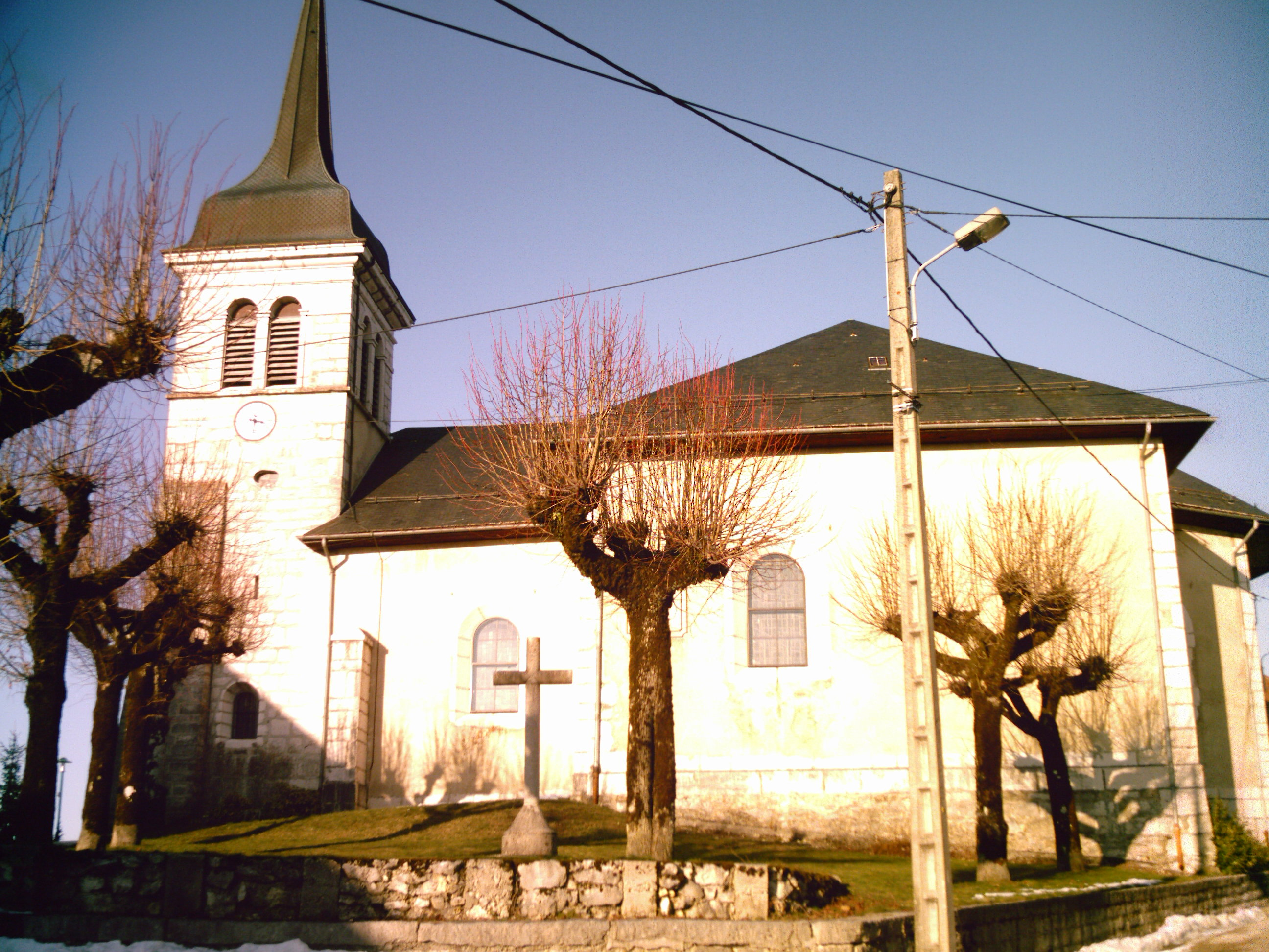 L'église d'Hauteville-Lompnès